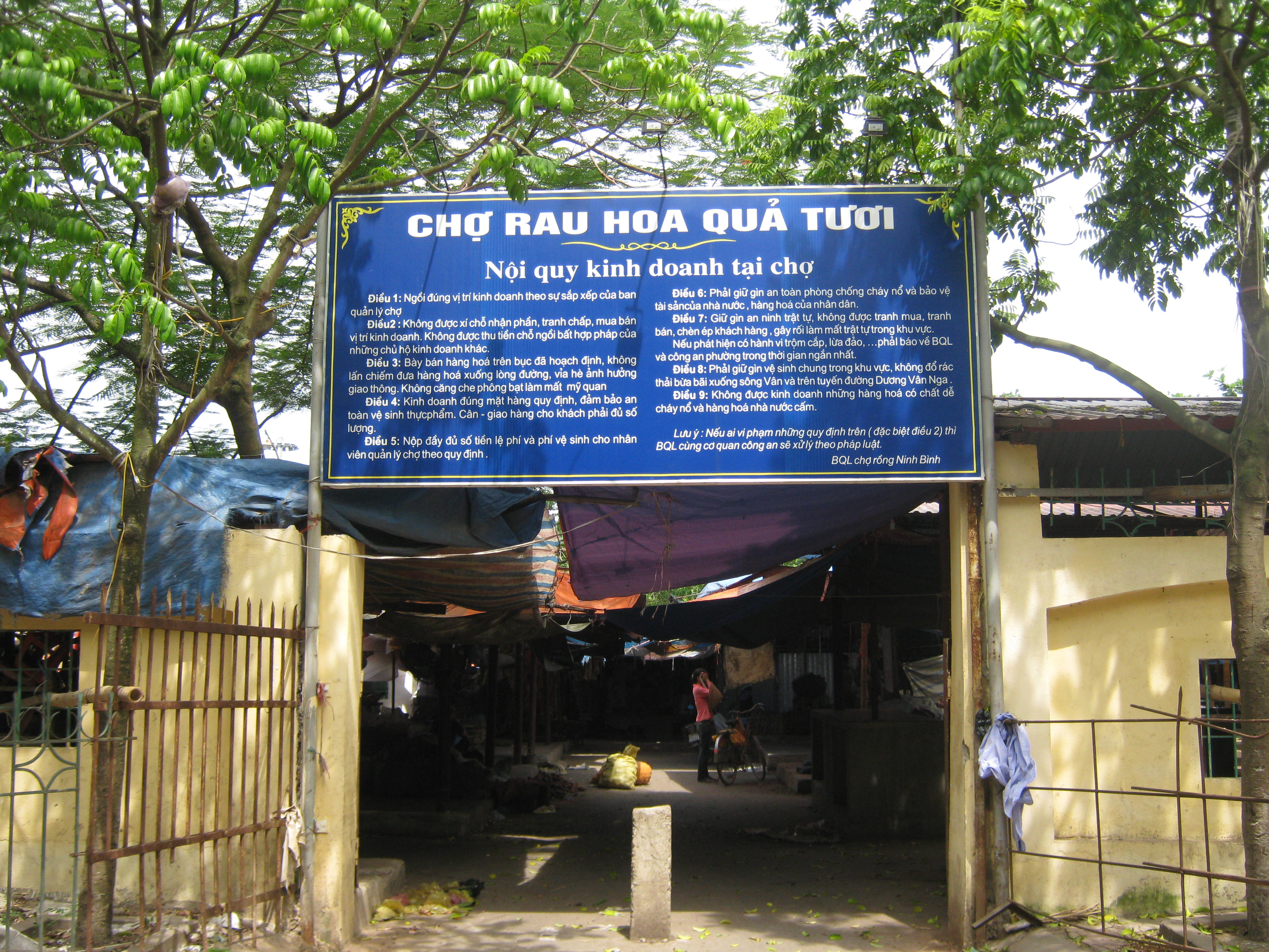 chợ Rồng Ninh Bình